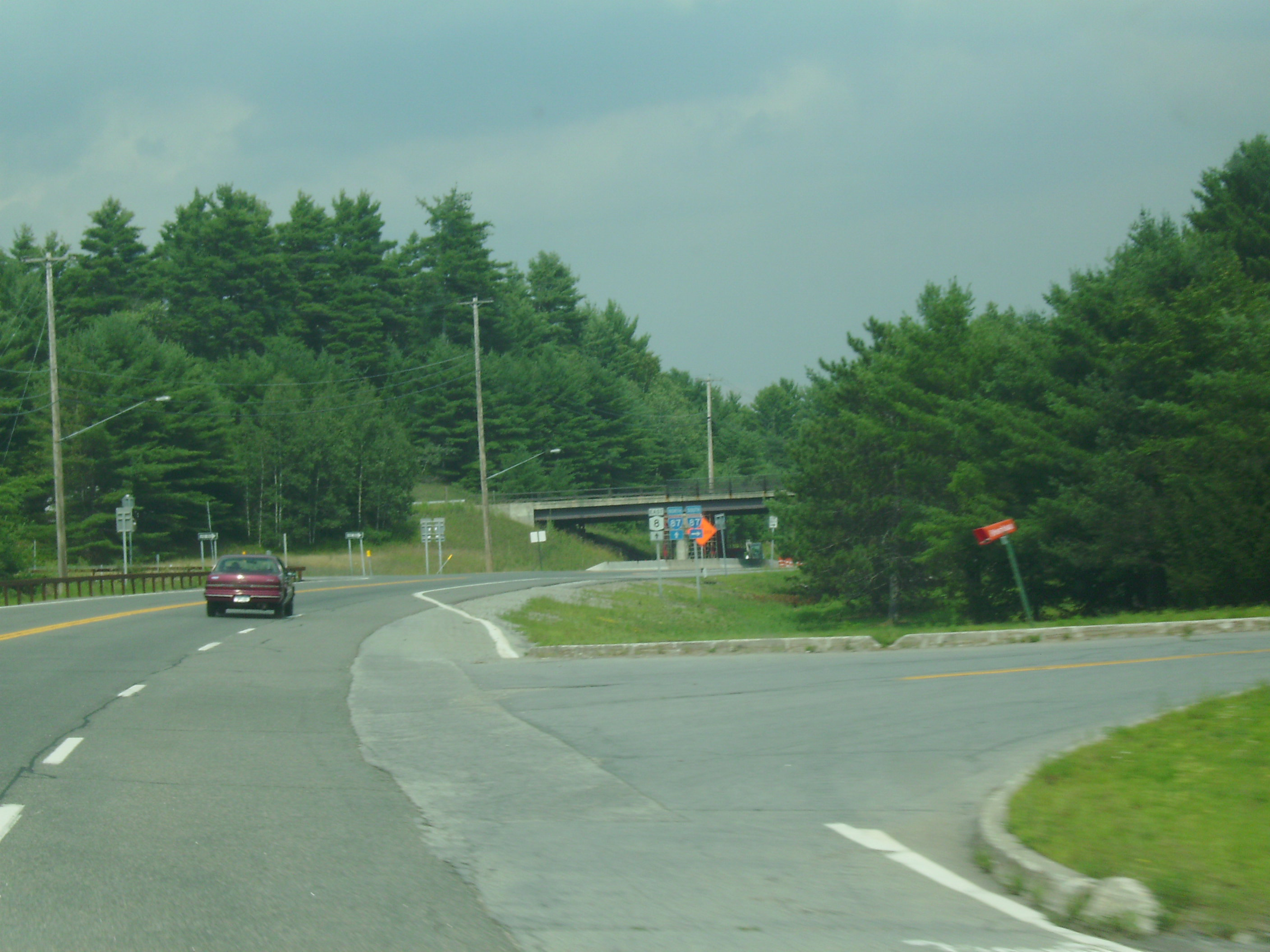 Vivitar